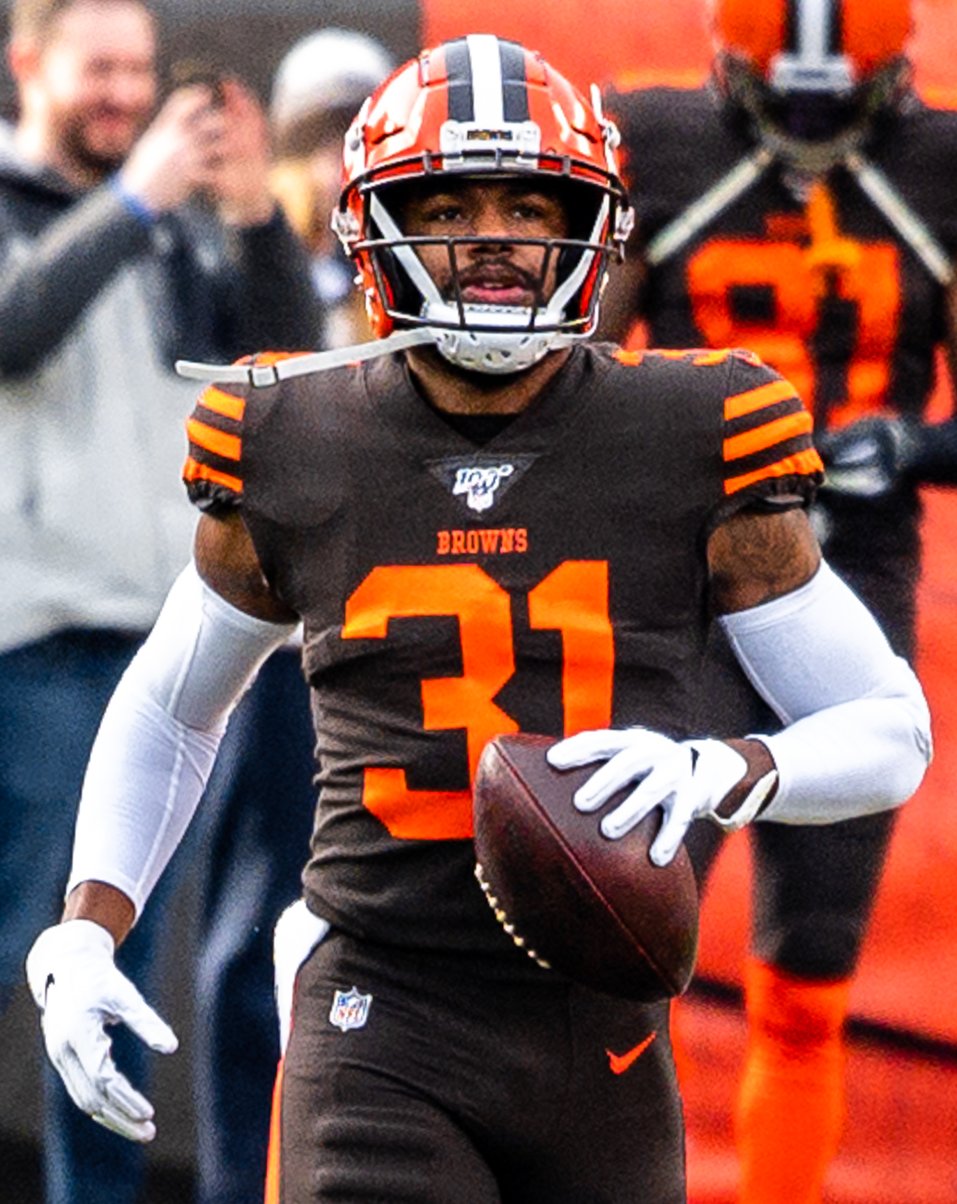 Juston Burris